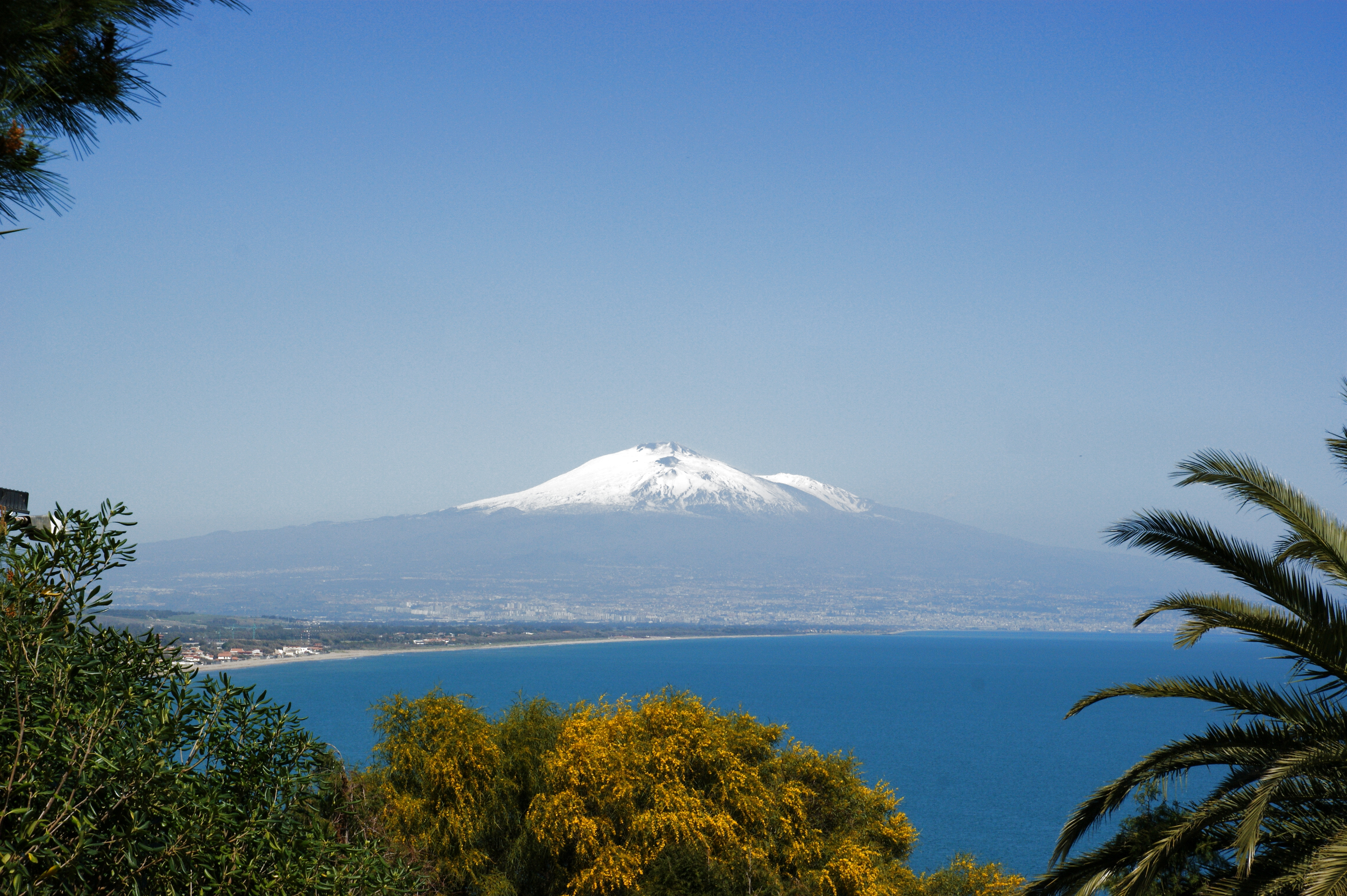 2009-03-22 03-29 Sizilien 551 Aetna